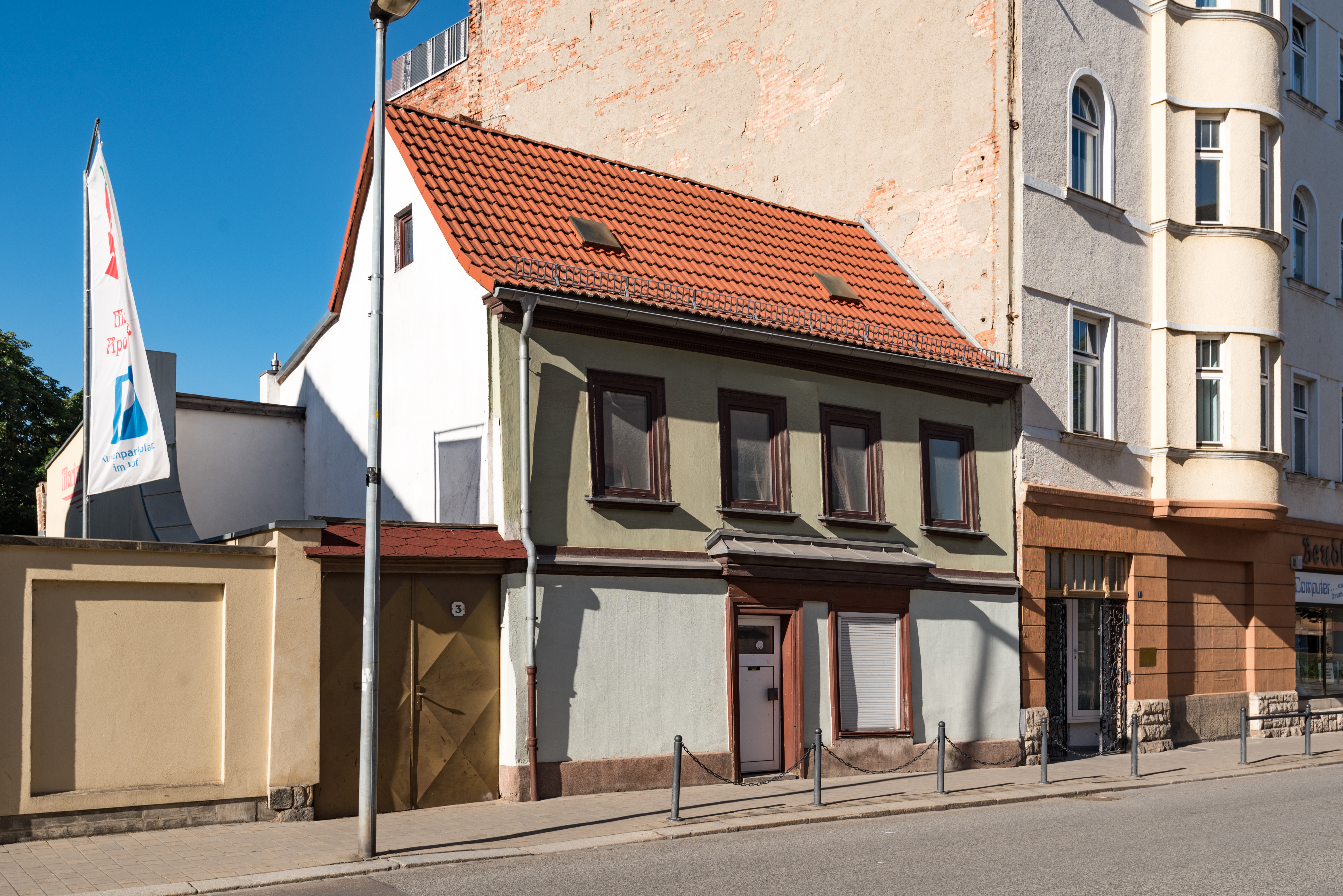 Weißenfels, Beuditzstraße 3